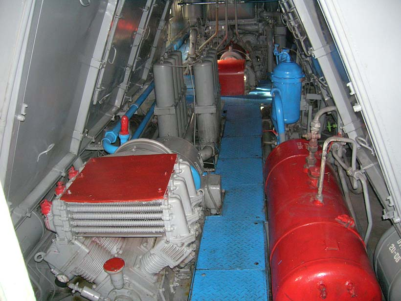 Шахта холодильника тепловоза ТЭП70 Вид из кабины на оборудование, расположенное под шахтой холодильника тепловоза ТЭП70